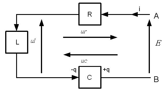 Schéma d'un circuit RLC en série. Description Schéma d'un circuit RLC série Date08/09/2008SourceZorglubeAuthorZorglubePermission (Reusing this file) libre diffusion, avec ou sans citation de l'auteur Schéma d'un circuit RLC série